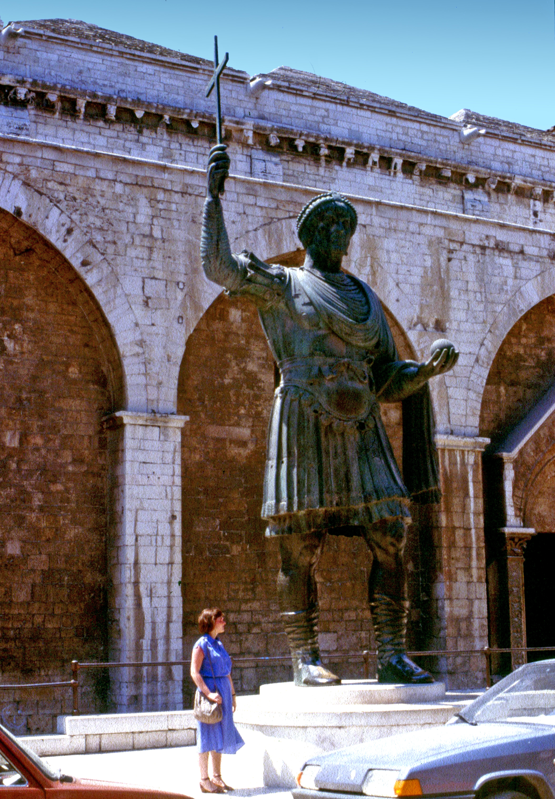 Koloss von Barletta